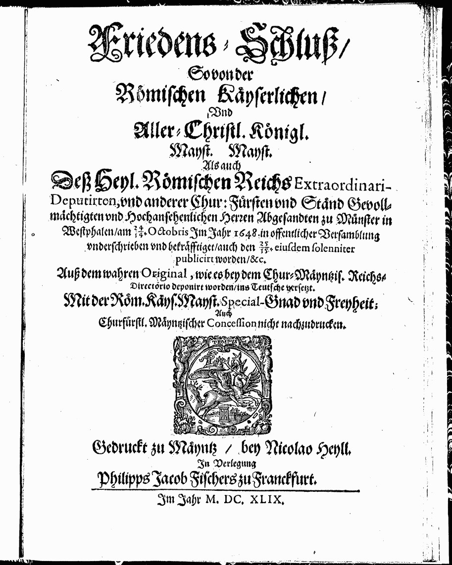 Scans des Drucks des Westfälischen Friedens, Vertrag von Münster